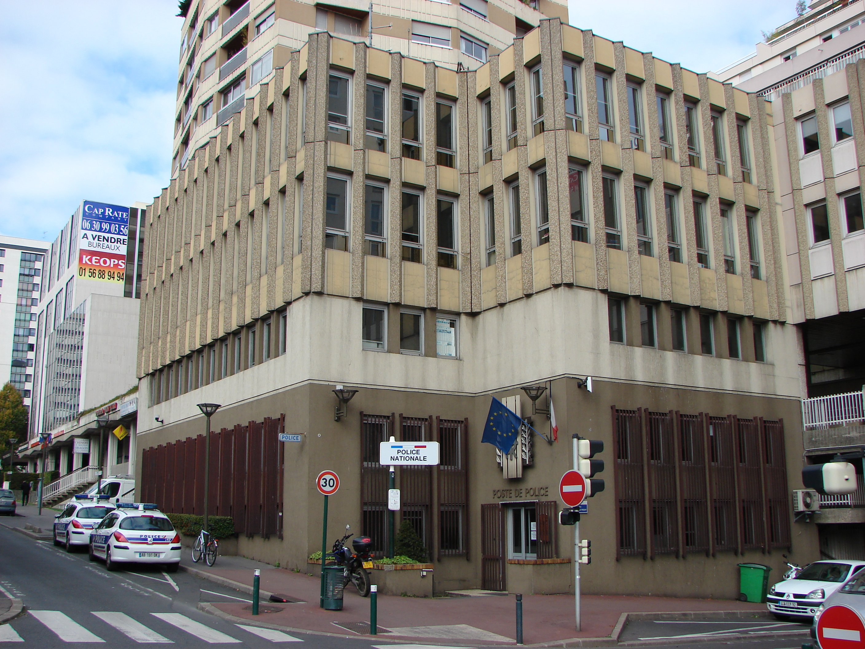 Bureau de Police Nationale situé bd Henri Sellier à Suresnes